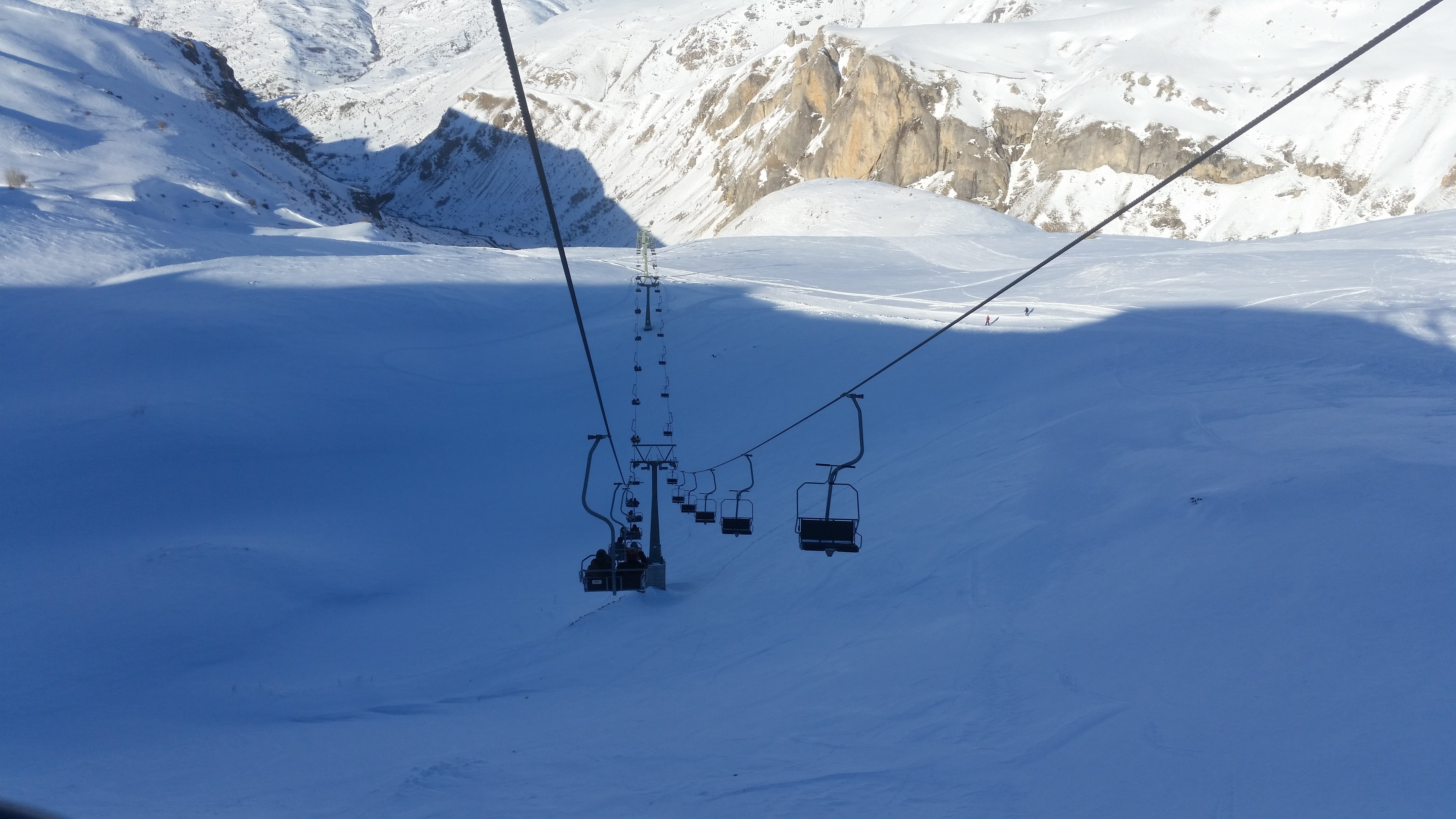 Oshlaku, Prizren